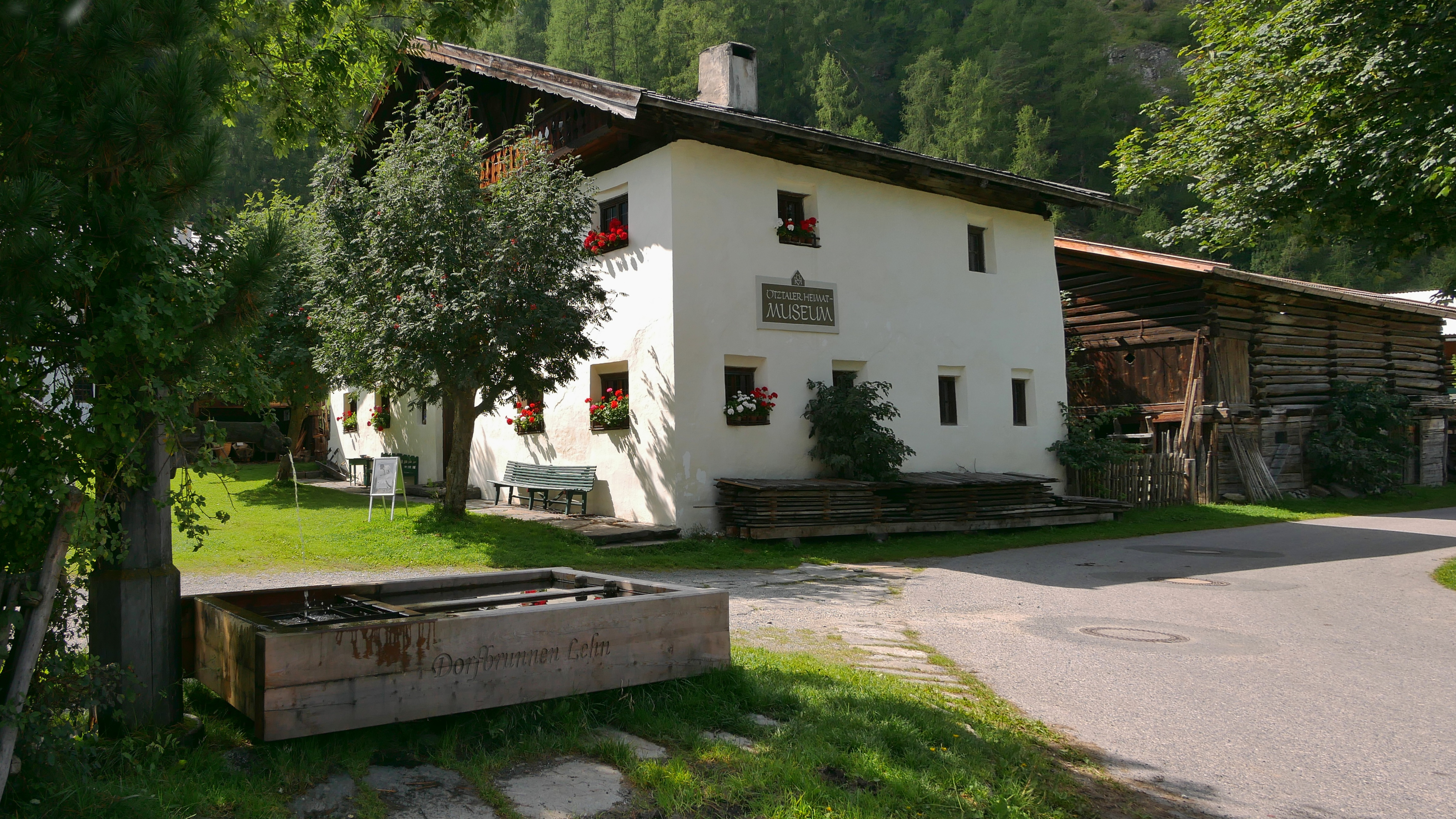 Ötztaler Freilichtmuseum, Längenfeld Ötztal/Tirol - Wohnhaus (Hauptgebäude) mit Wirtschaftsgebäude